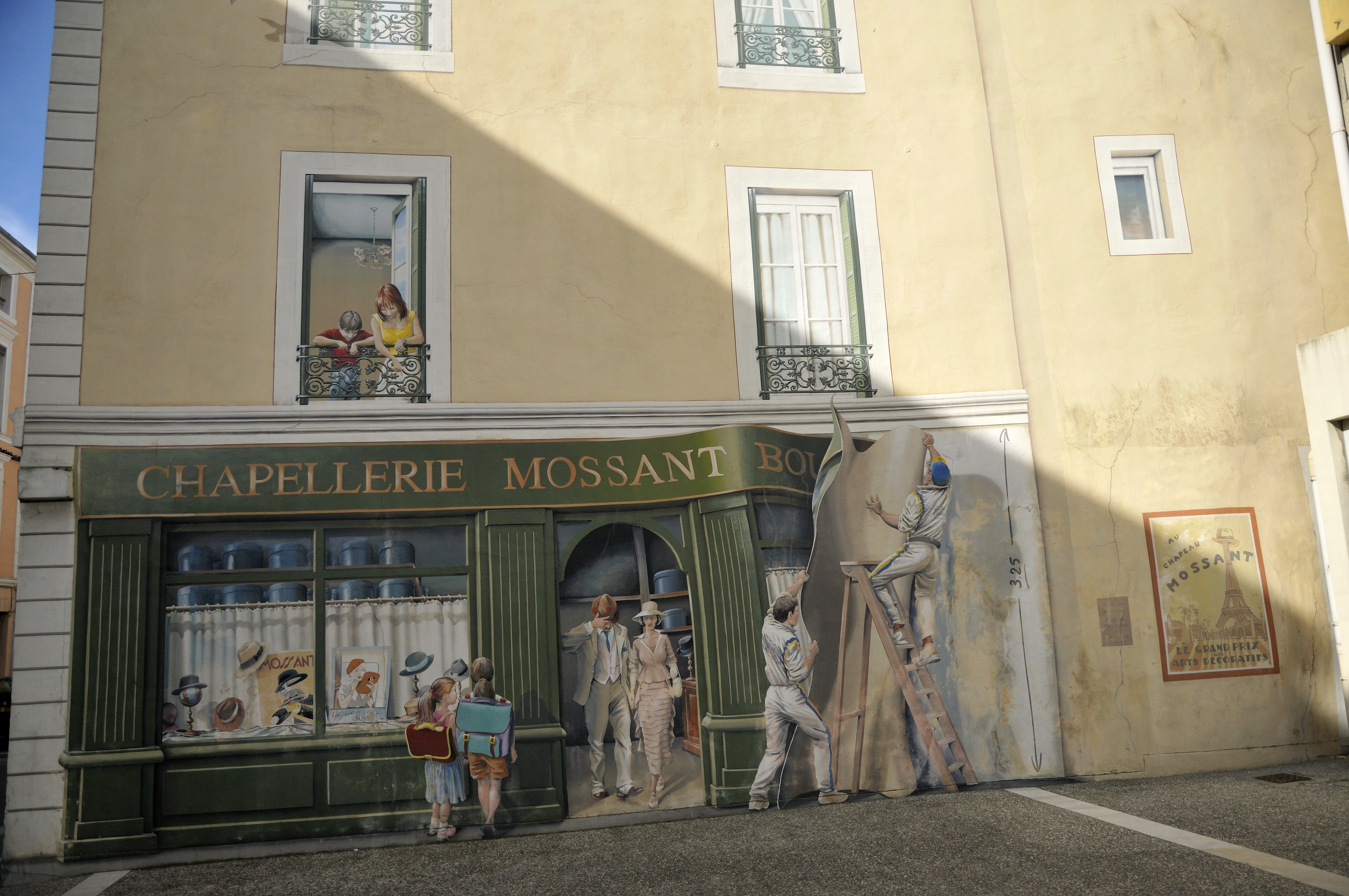 hommage au chapelier Mossant